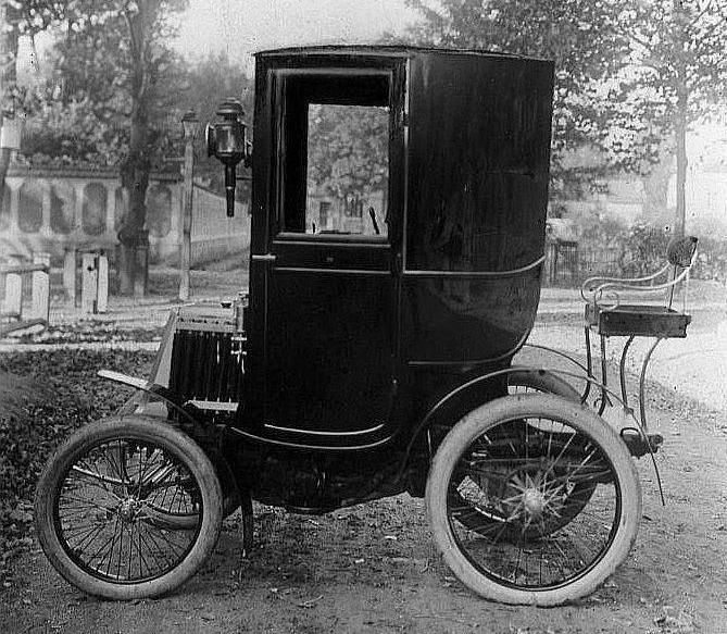 Renault Type B (1900).